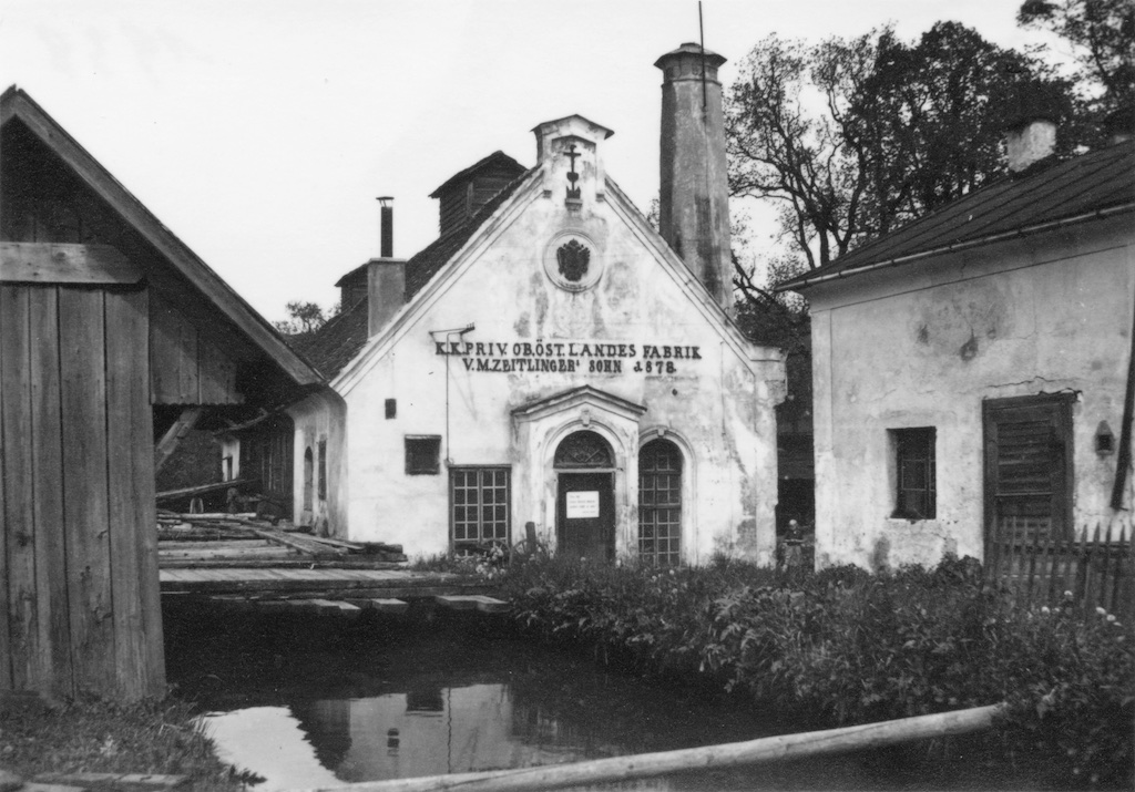 Sensenschmiede Blumau, Haushammer (1938)